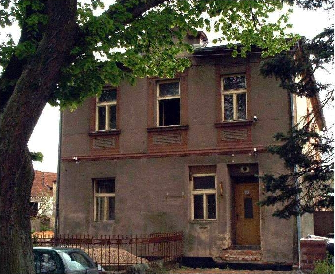 Rodný dům Karla Ančerla (1908-1973) v Tučapech na Táborsku –(v rekonstrukci) foto. 2005